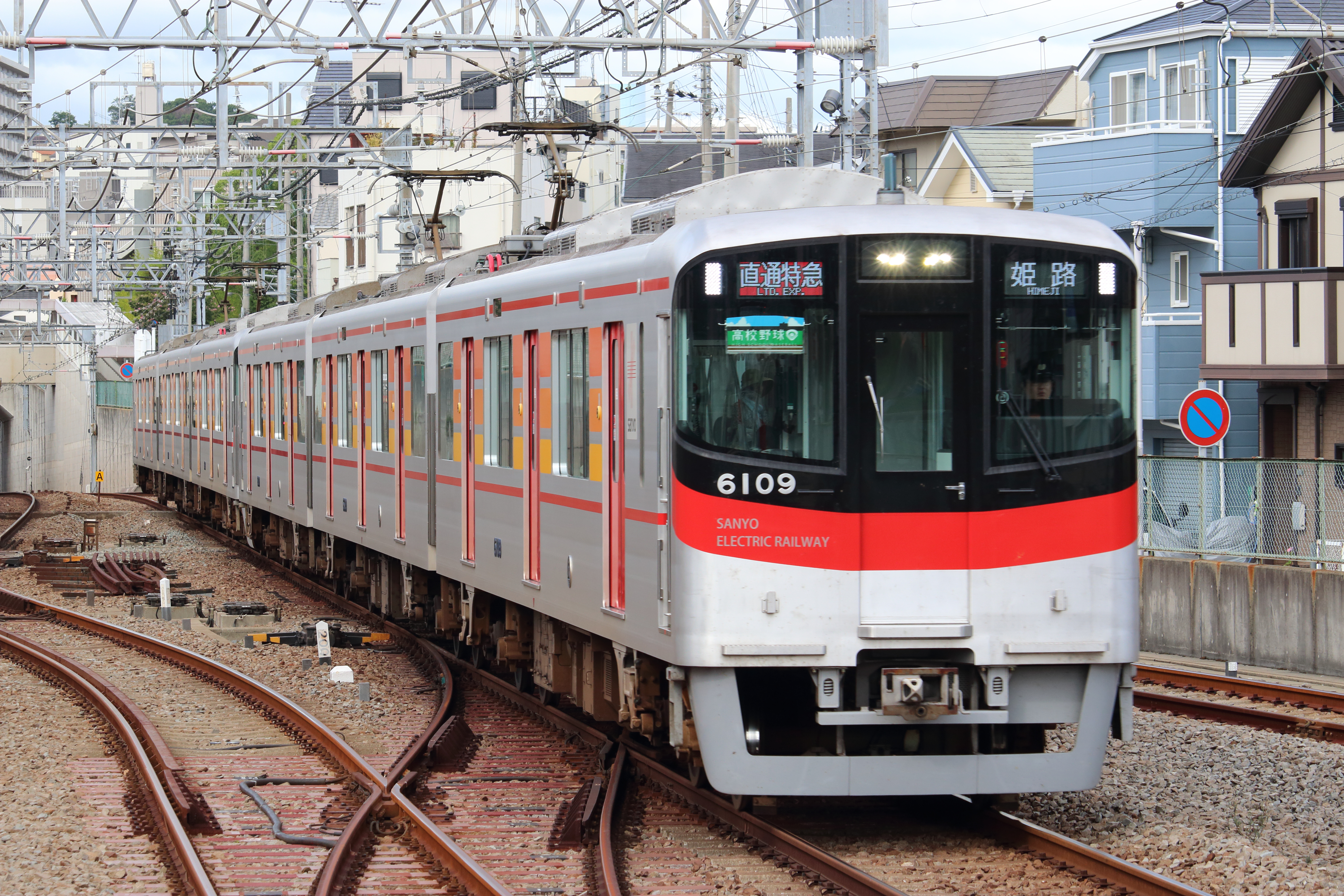 山陽6000系 6008-6009F 直通特急 東須磨駅